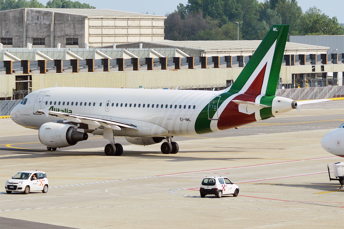 Alitalia, EI-IML, Airbus A319-112